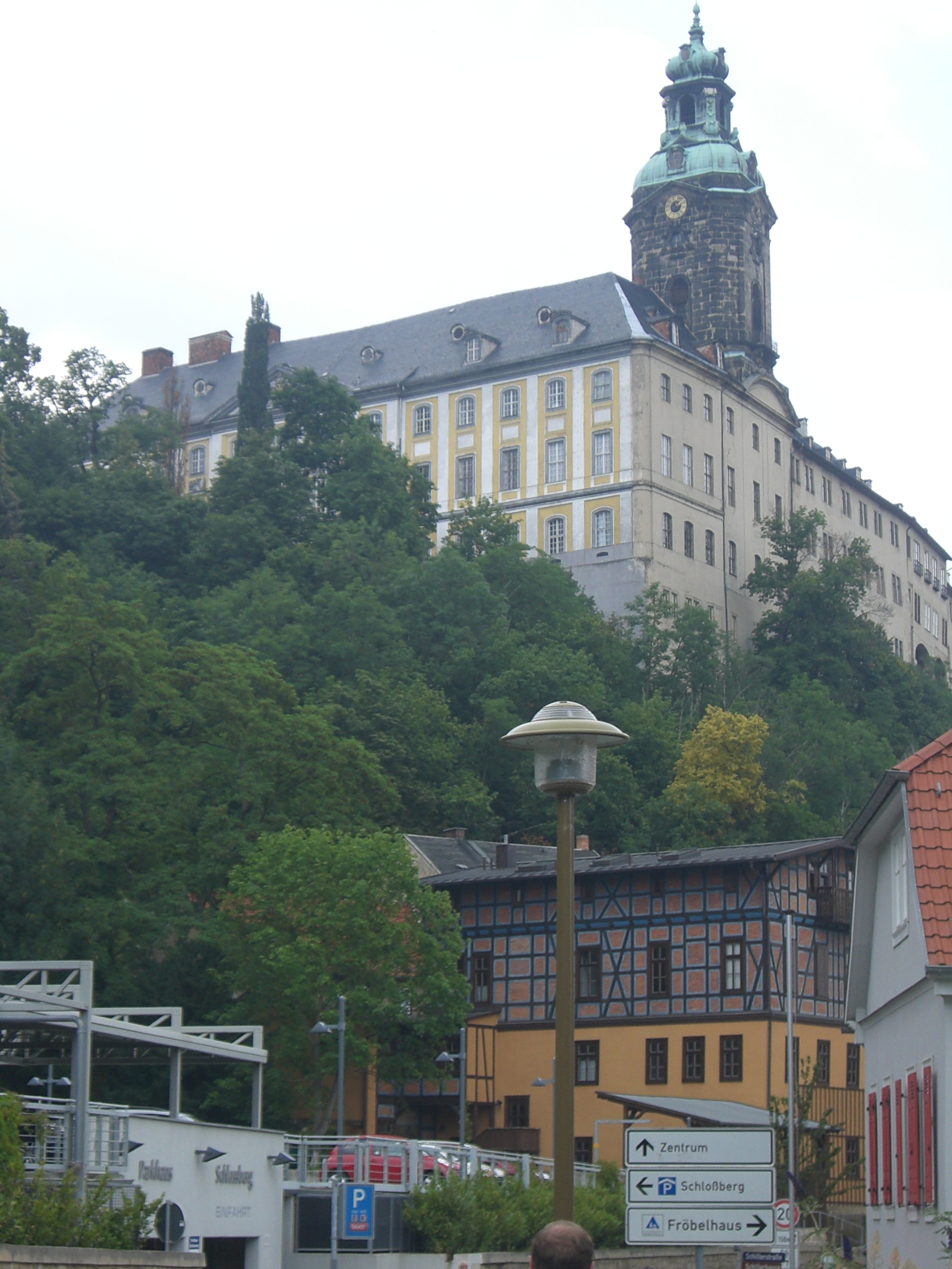 Die Heidecksburg in Rudolstadt (Thüringen)